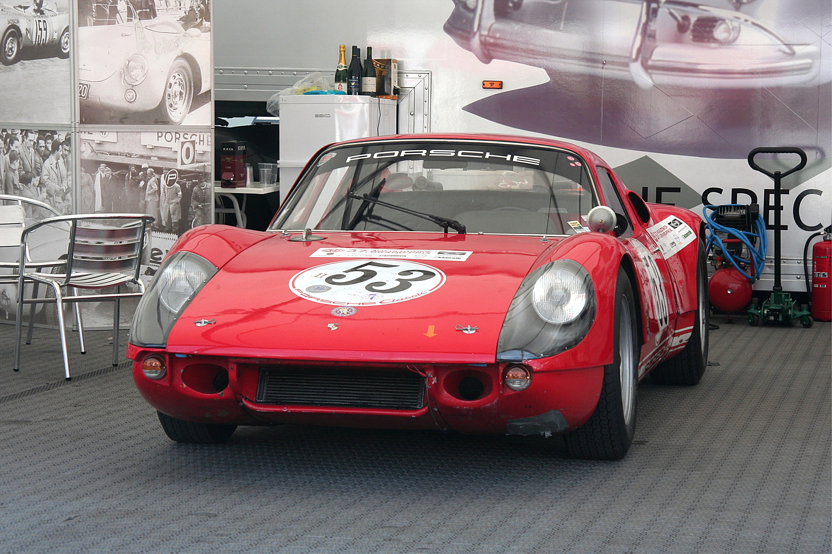 Porsche 904 beim AvD-Oldtimer-Grand-Prix 2009 auf dem Nürburgring